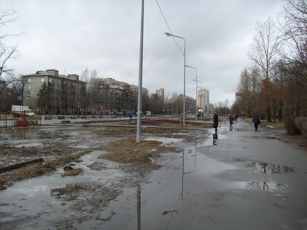 Дачный проспект, Санкт-Петербург